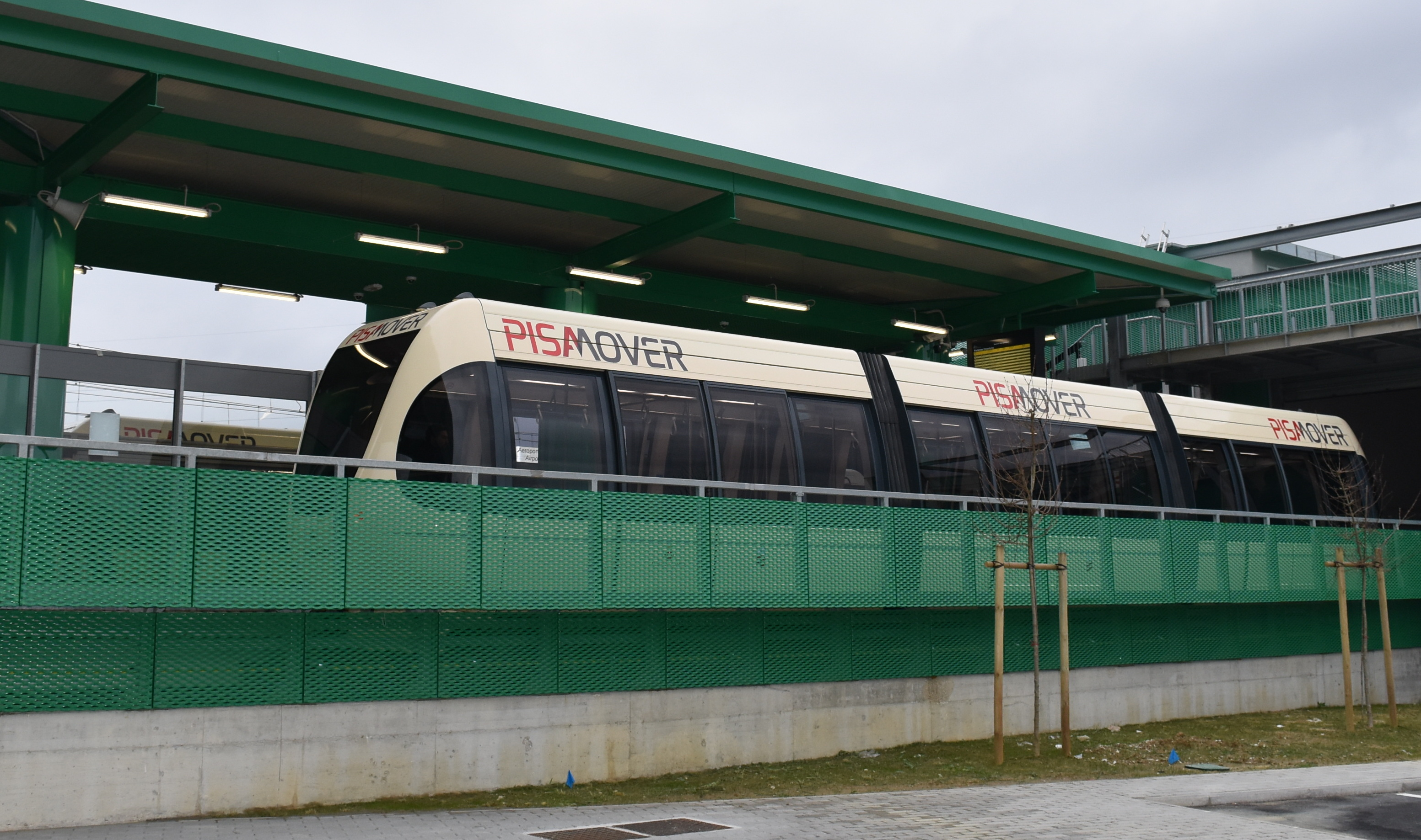 Scattata alla fermata di San Giusto - Aurelia